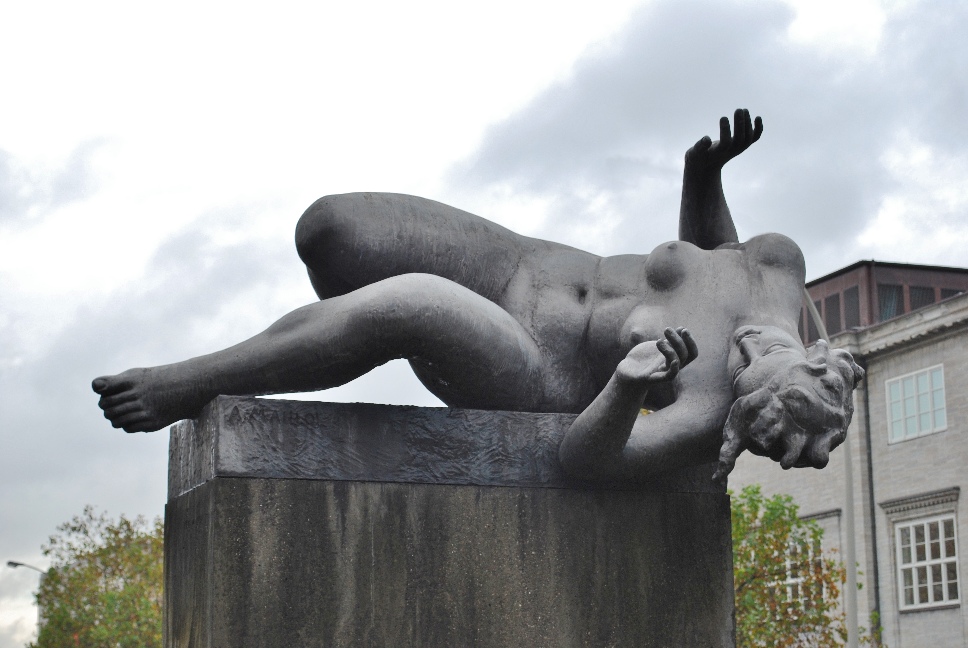 Гамбург, художественная галерея, "Река", 1939 г., скульптура Аристида Меллоля (1861-1944)